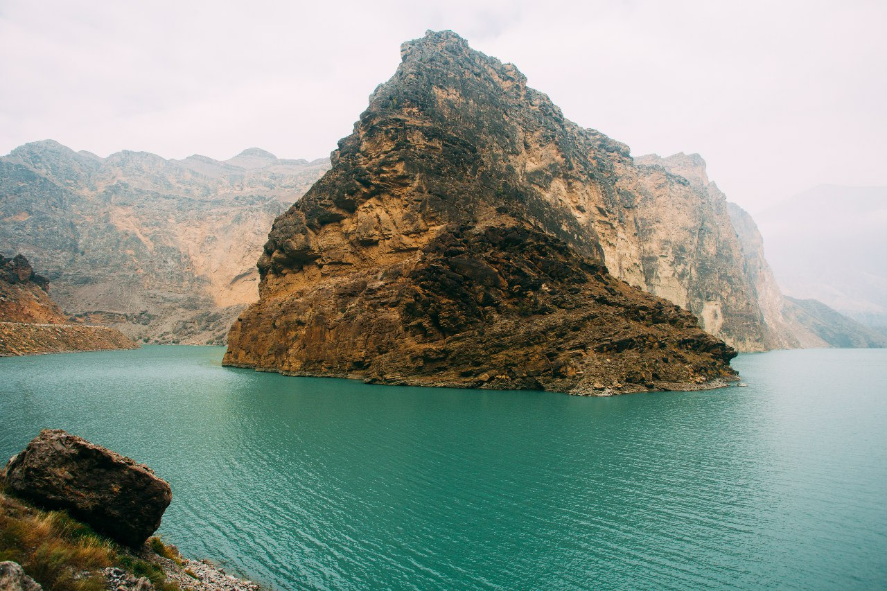 Место слияния рек Аварское Койсу и Андийское Койсу